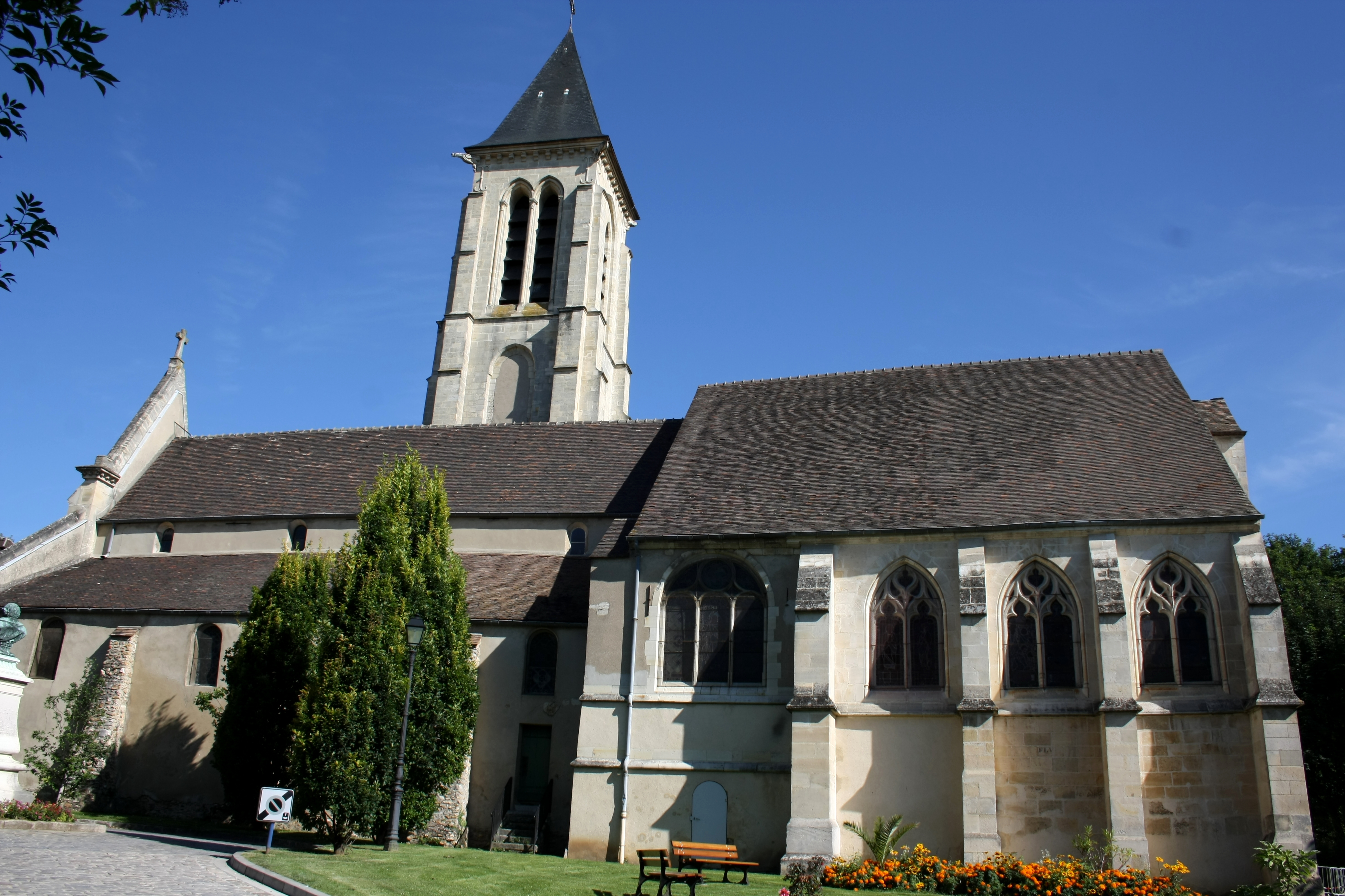 katholische Pfarrkirche Saint-Martin in Cormeilles-en-Parisis im Département Val-d’Oise (Île-de-France)